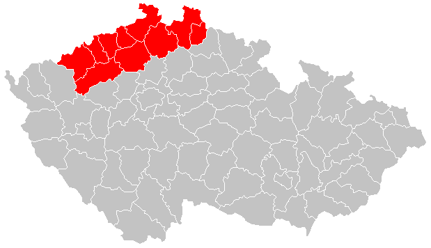 Severočeský kraj podle zákona č. 36/1960 Sb., o územním členění státu